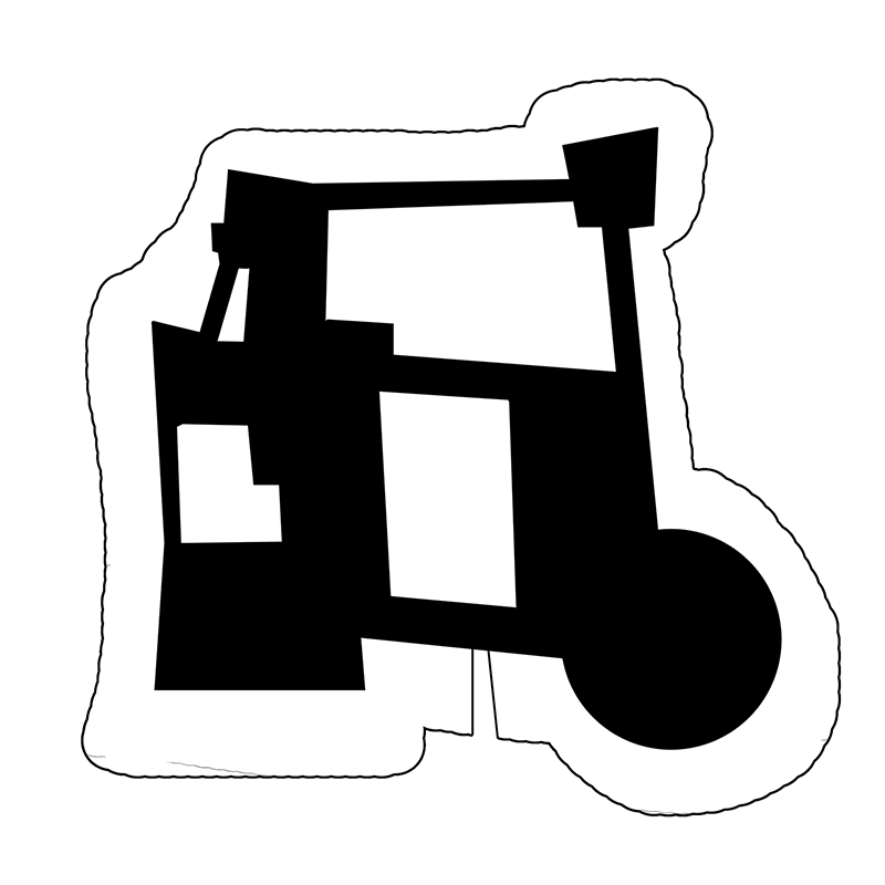 Pianta del castello